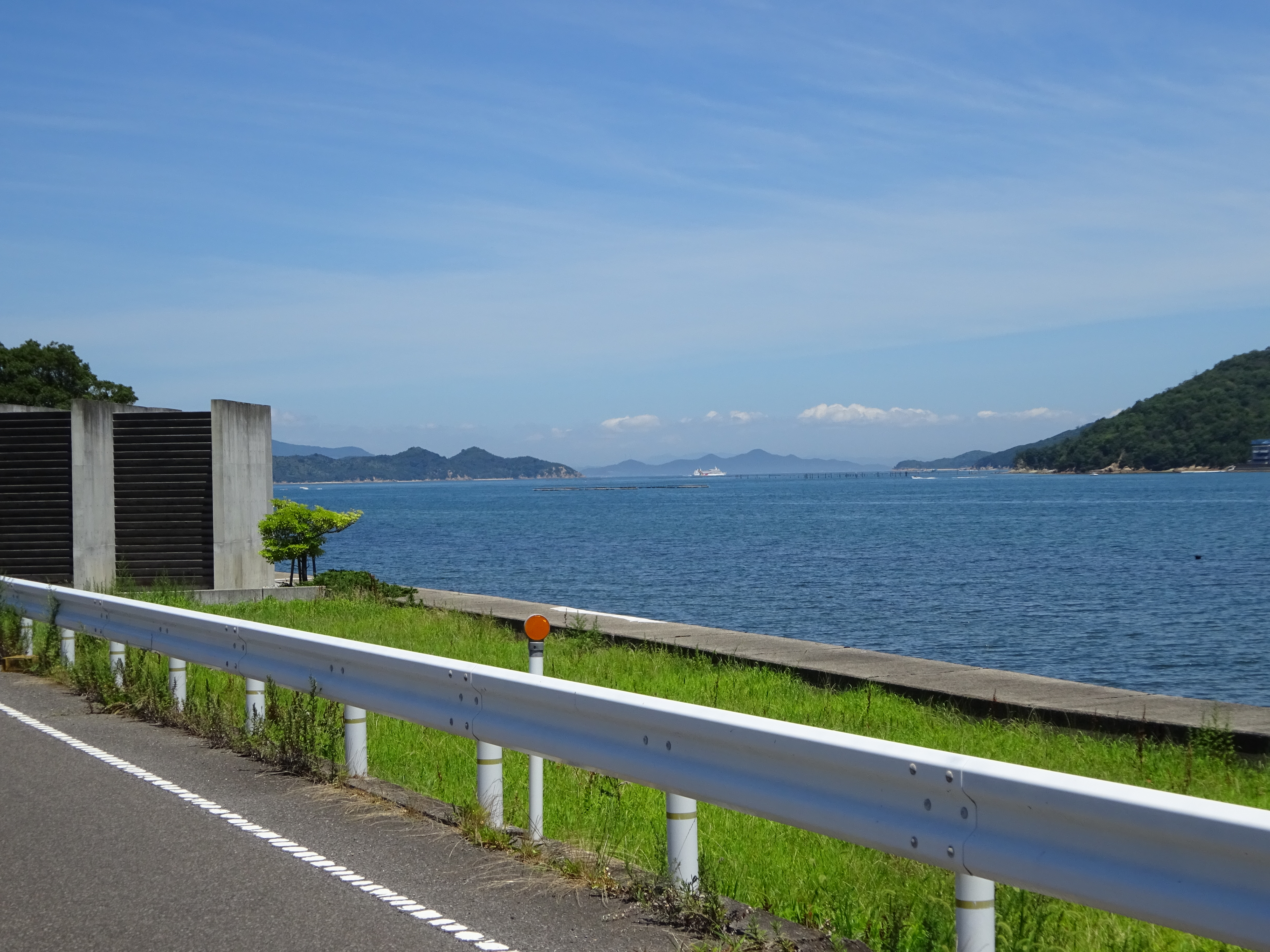 屋島外周の県道沿いで屋島湾を望む（七月下旬）